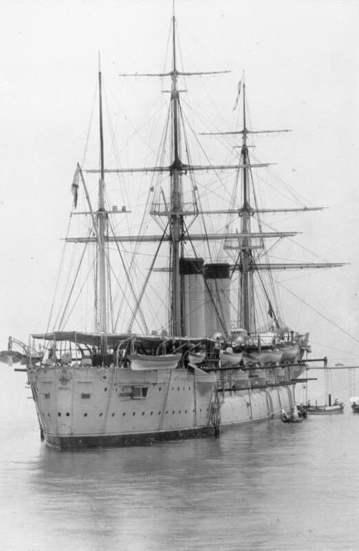 China 1898, Tsingtau "Rurik"